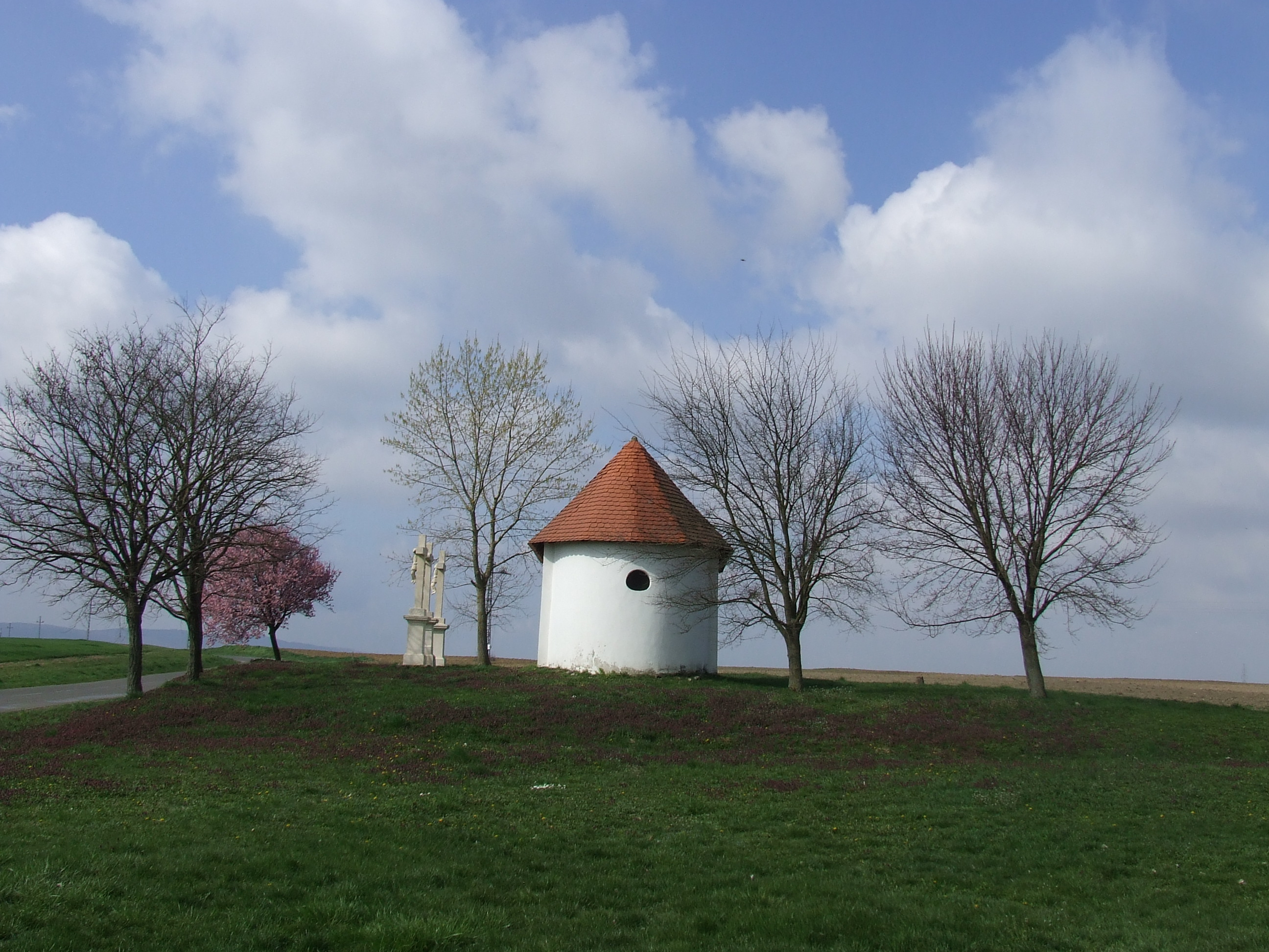 Kápolna